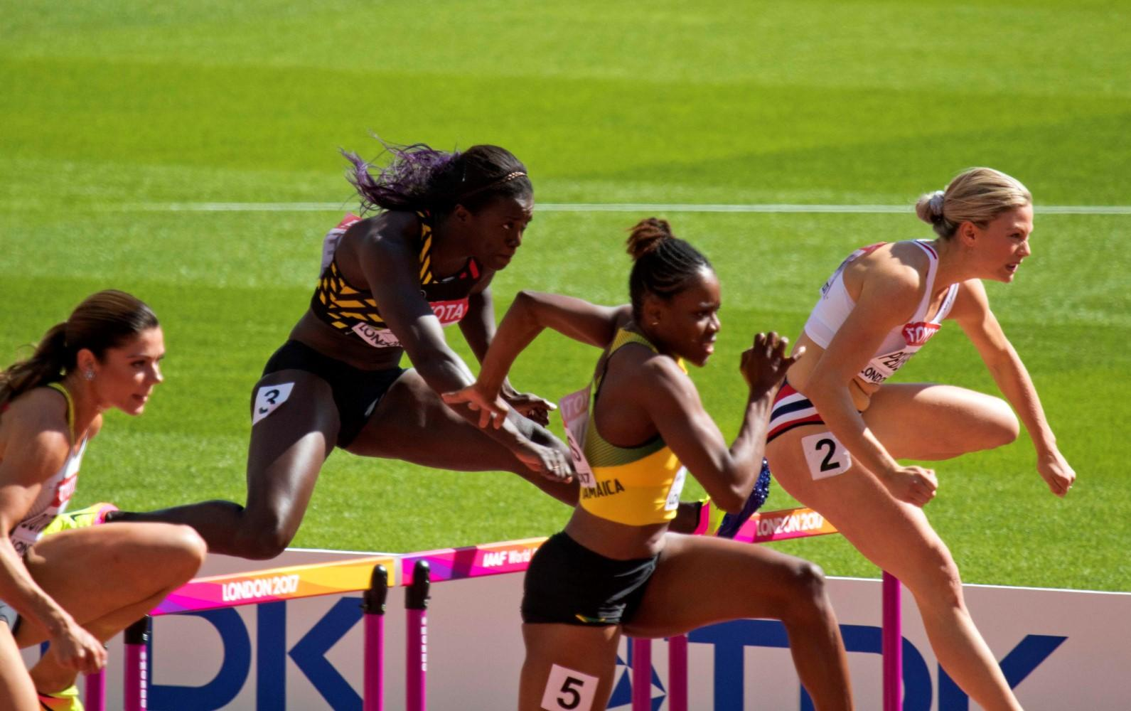 d7_3 zagré 100mH